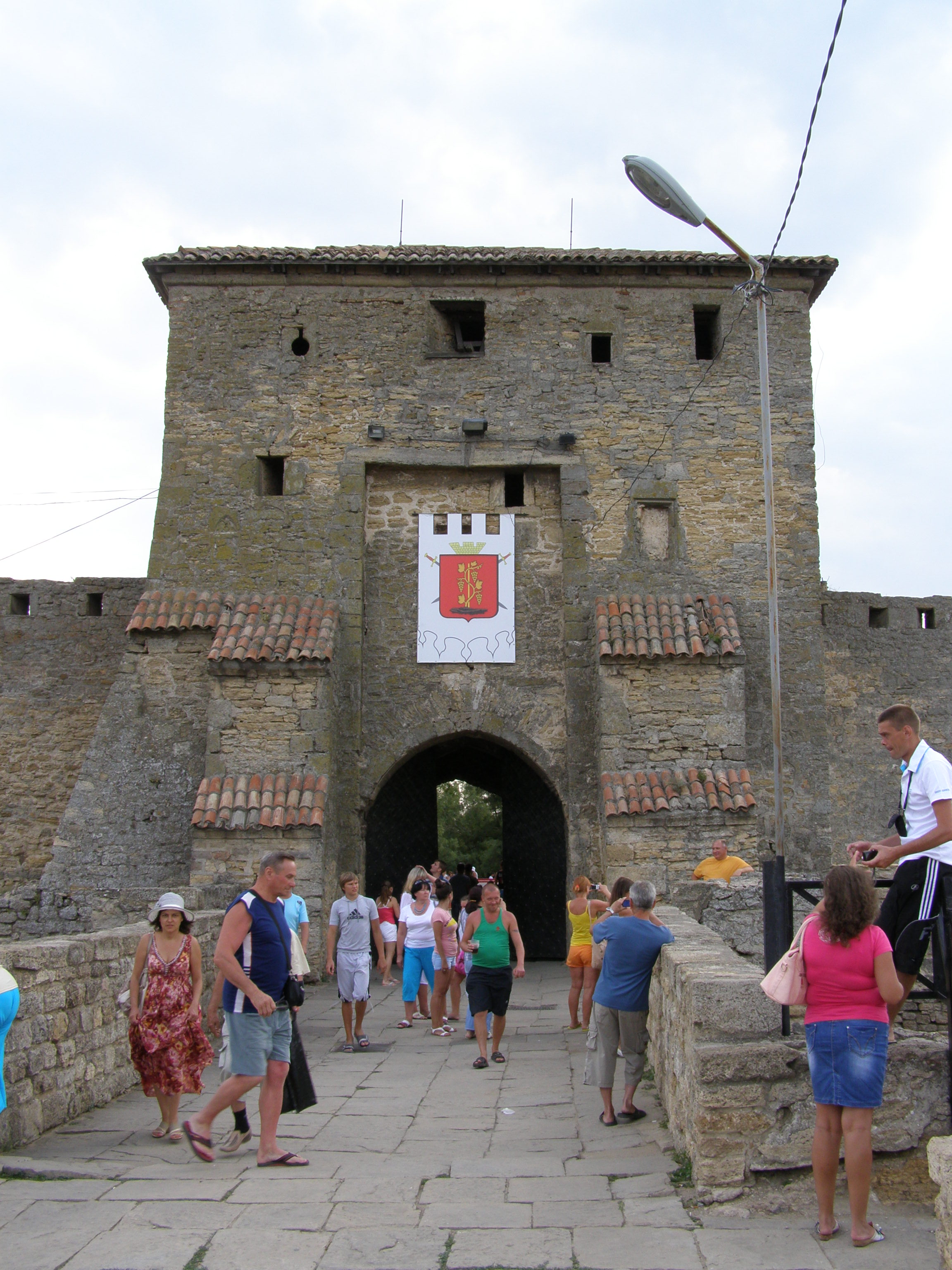 Аккерманська фортеця (Білгород-Дністровська фортеця)